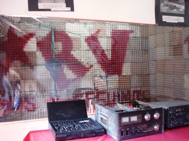 Interiror de la Radio Venceremos